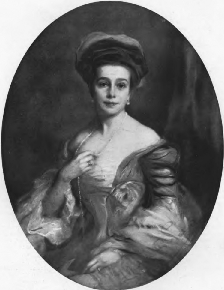 Helena z Radziwiłłów Potocka (1874-1954)